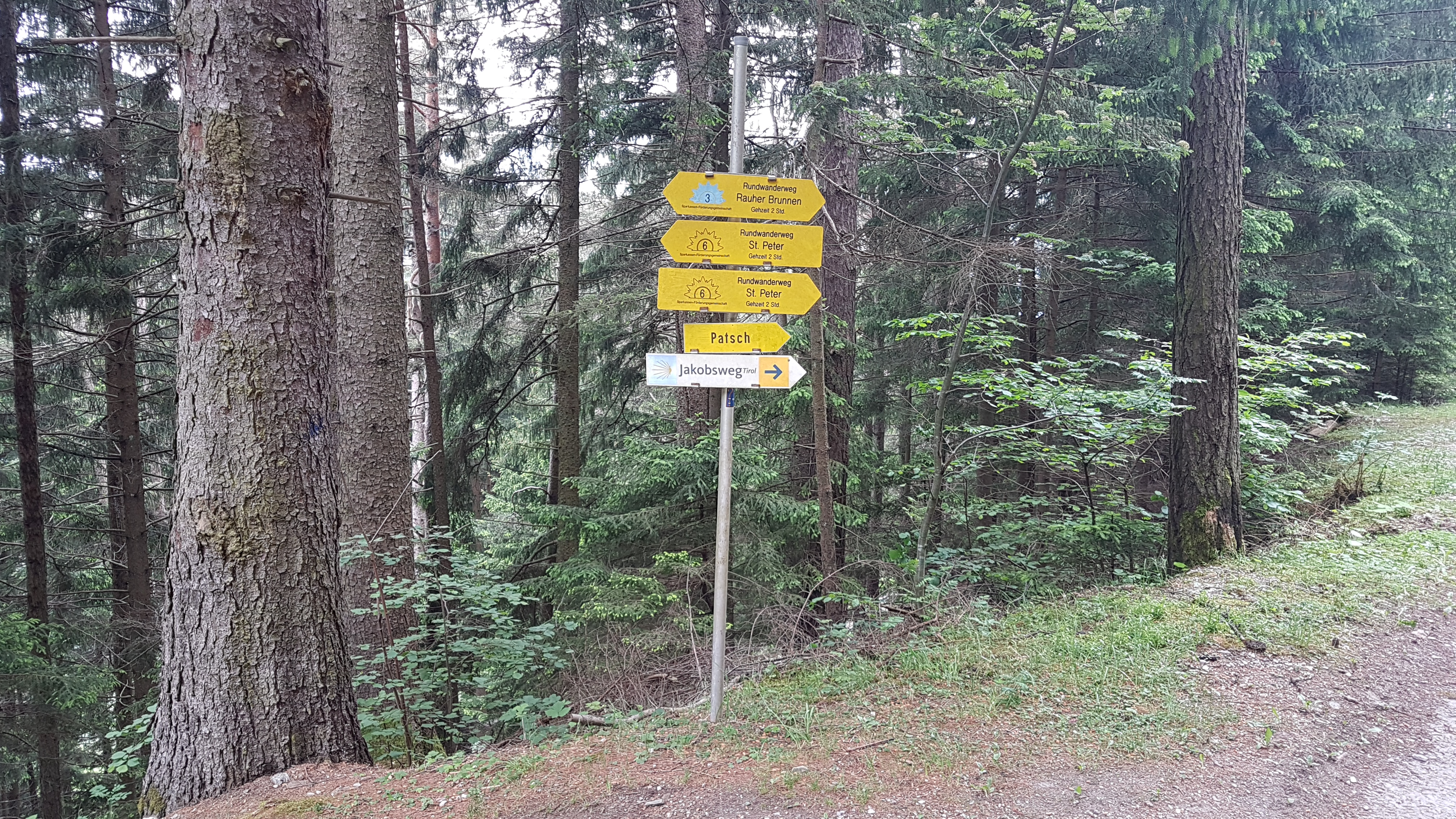 Jakobsweg Tirol. Ein Hinweisschild nach Innsbruck in der Nähe des Brennerpasses.